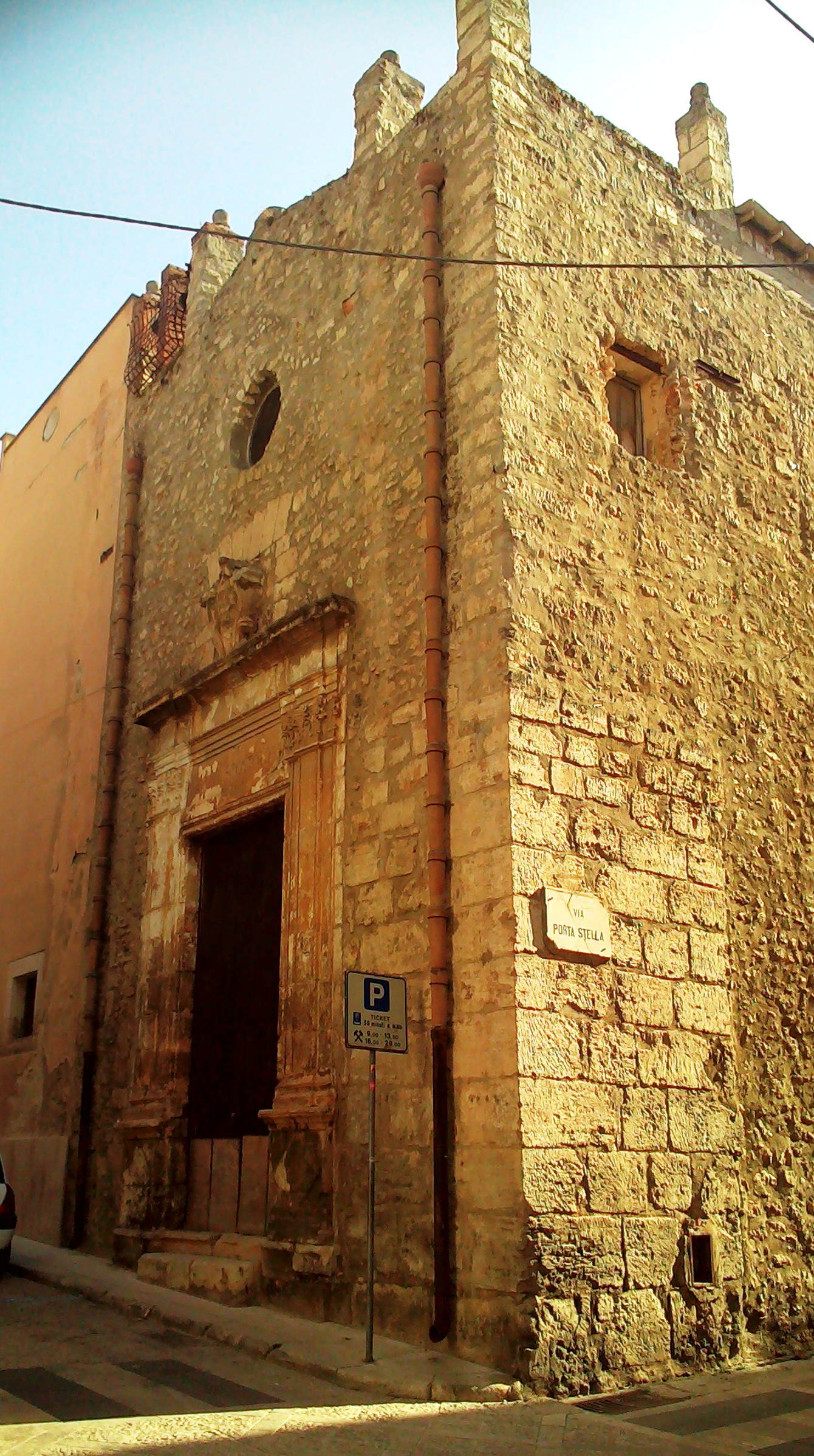 La facciata